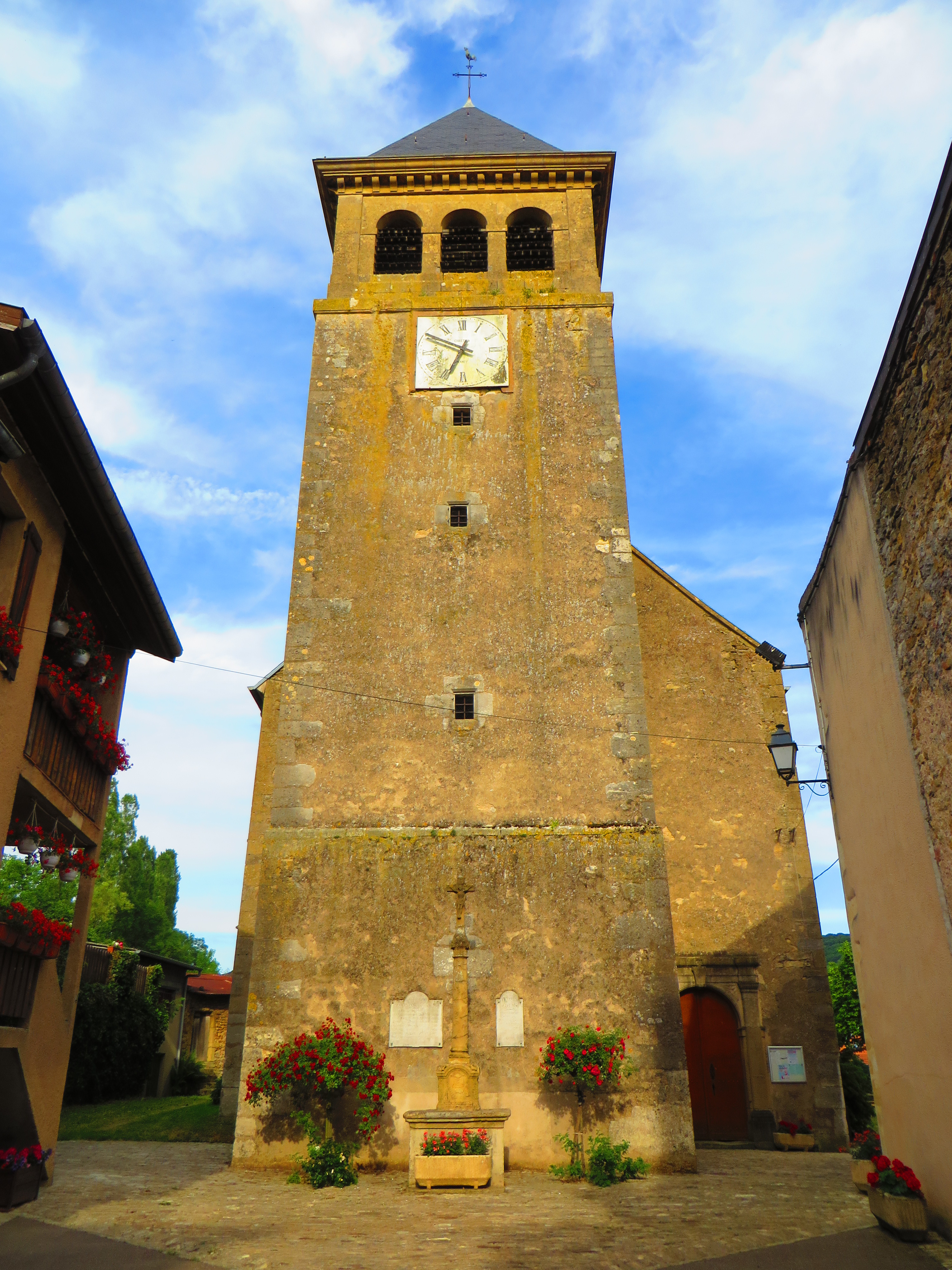 Bayonville-sur-Mad église Saint-Julien